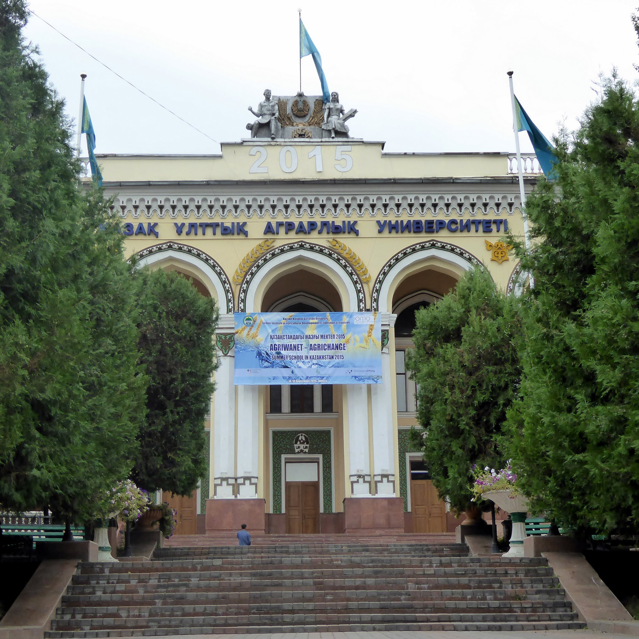 Казахский национальный аграрный университет (Алматы)